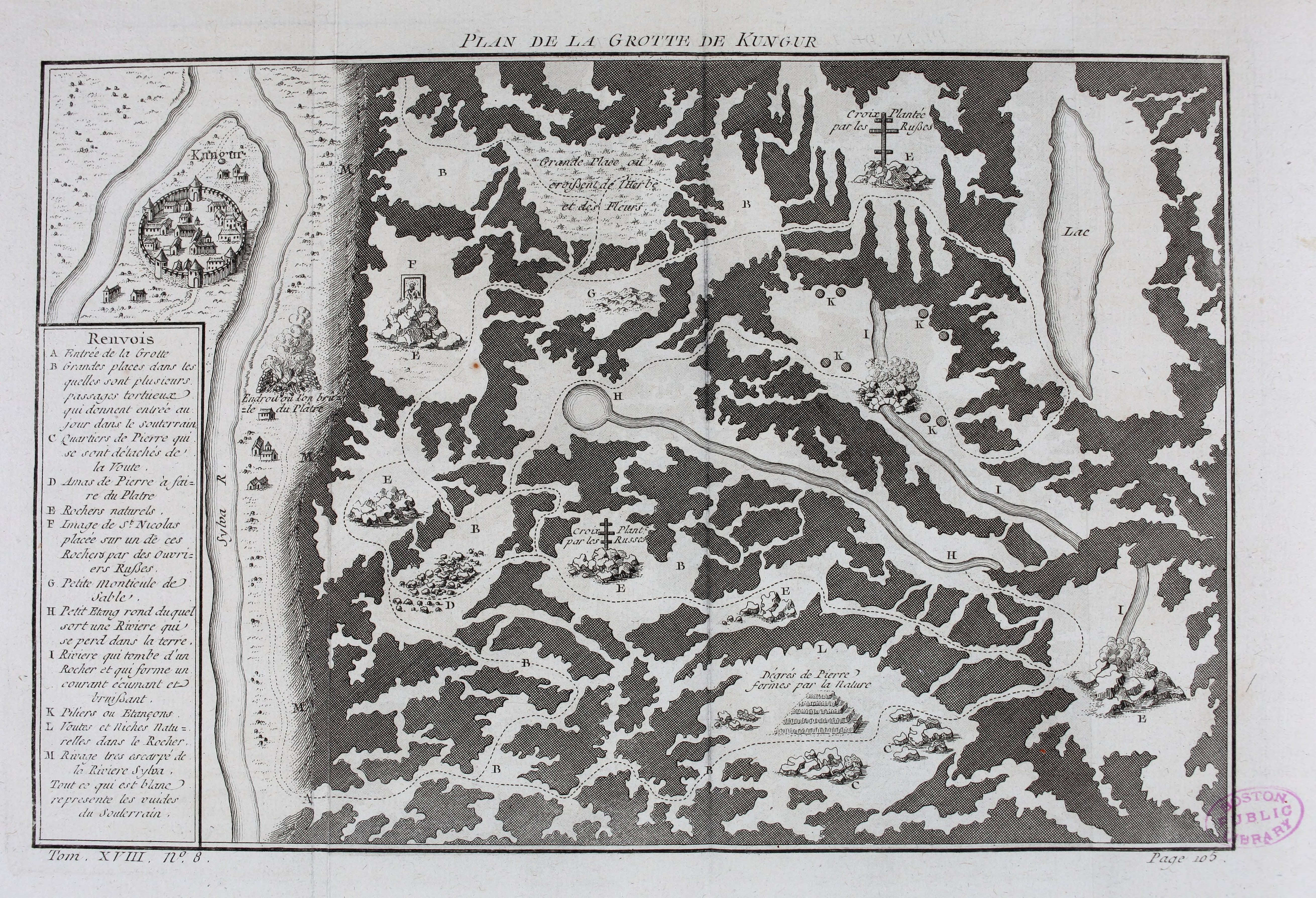 Plan de la Grotte de Kungur, 1768